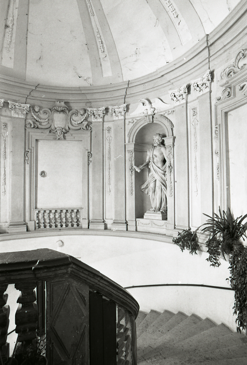 Servizio fotografico : Ferrara, 1981 / Paolo Monti. - Strisce: 3, Fotogrammi complessivi: 10 : Negativo b/n, gelatina bromuro d'argento/ pellicola ; 35 mm. - ((Sul portanegativi: N[I]K[MA]T FP4 e iscrizione: "Scala Palazzo Sacrati 28-37". - Occasione: Documentazione (interni ed esterni di chiese e palazzi ferraresi - scala del Palazzo Sacrati (secondo l'ordine del Professor Andrea Emiliani) -. - : IV. Commesse/ Fattura n. 30/ Fotografie interni ed esterni di chiese e palazzi ferraresi (1981/10/07), presso Archivio Paolo Monti. N. 15 riprese scala del Palazzo Sacrati. - Fonte: Agenda di Paolo Monti: Nikon Leika 3001-/ Monti 1978 (1978-1982), presso Archivio Paolo Monti. - Fonte: Fattura di Paolo Monti